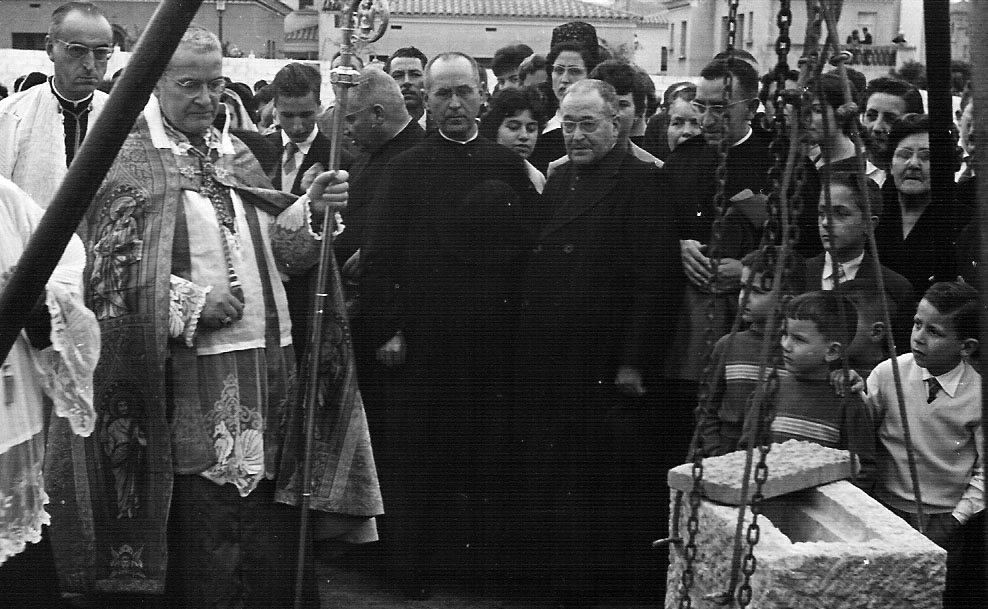 Foto feta pel meu avi de la col·locació de la primera pedra de la nova escola del Sagrat Cor de Jesús.